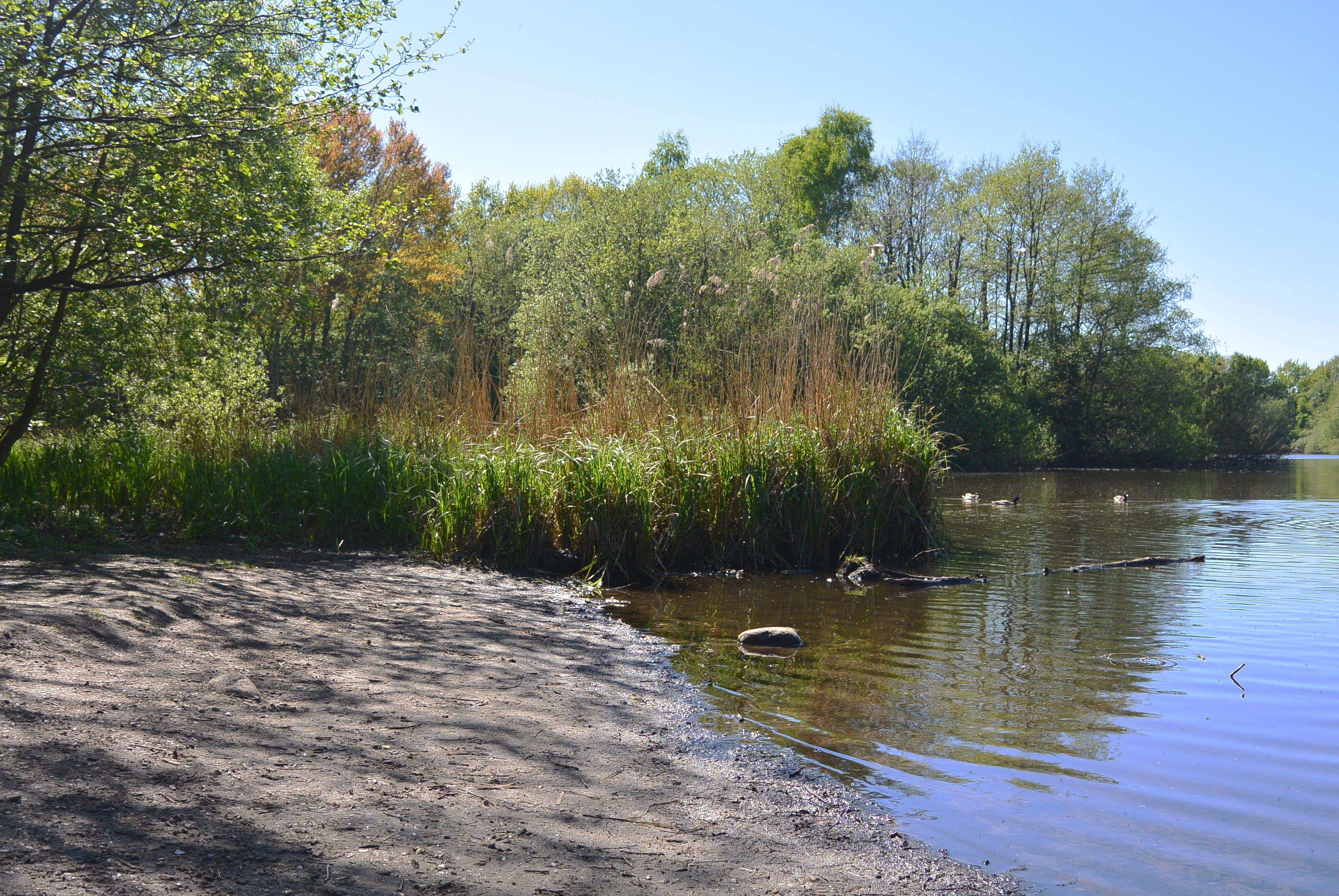 Helmuth-Schack-See, Hamburg